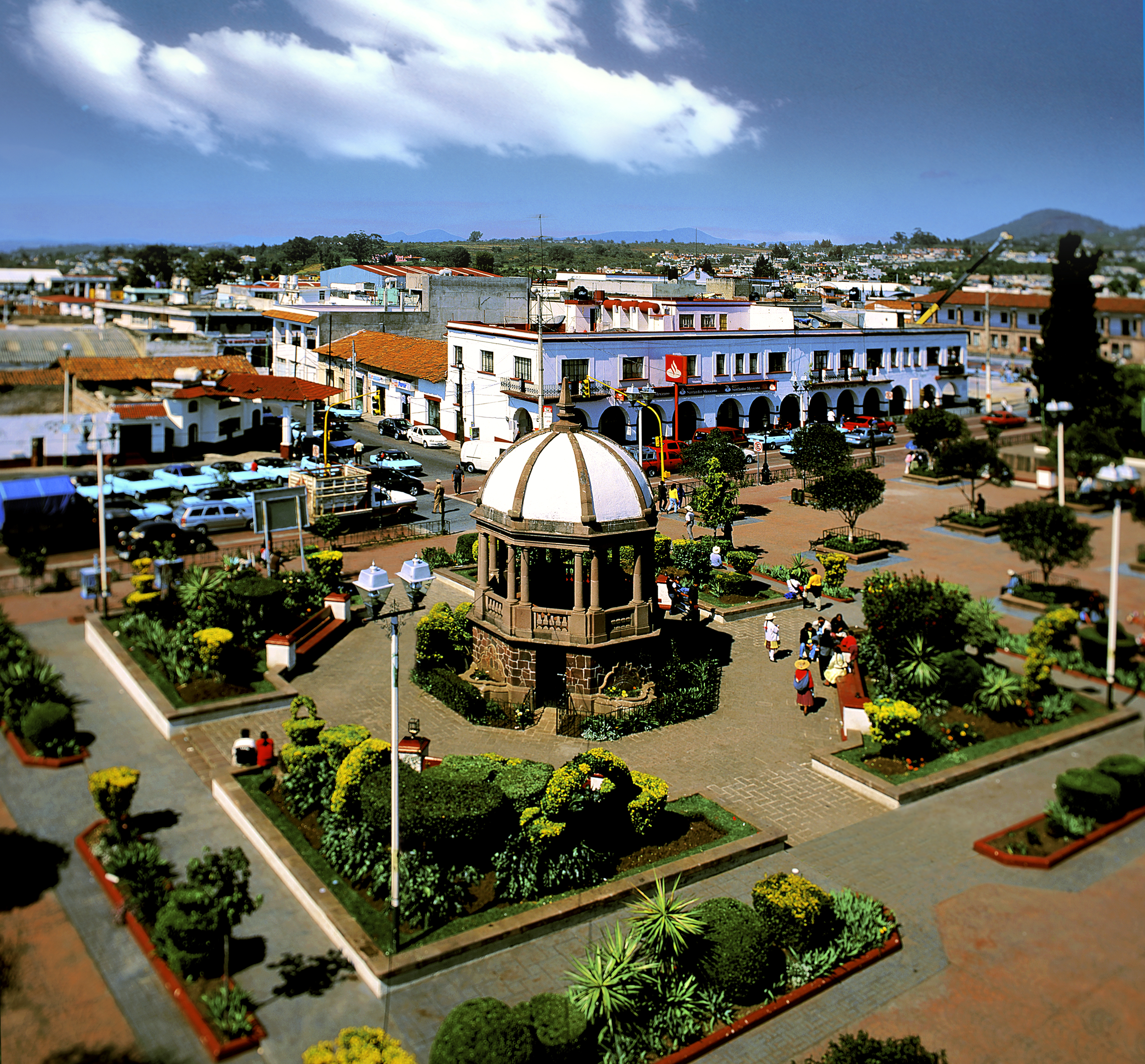 Atlacomulco Zócalo, Estado de México/ Atlacomulco Zócalo State of Mexico